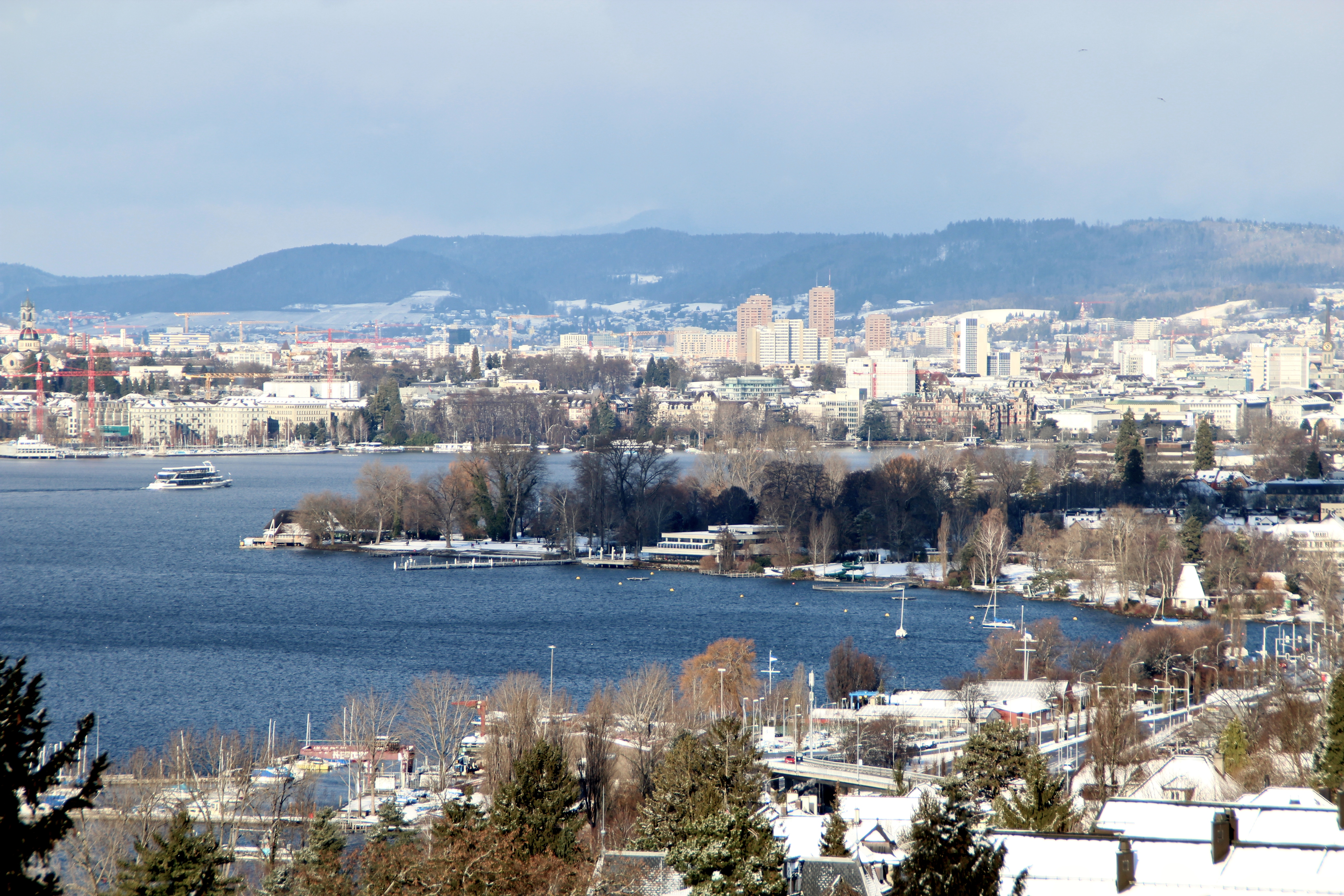 Zürichhorn